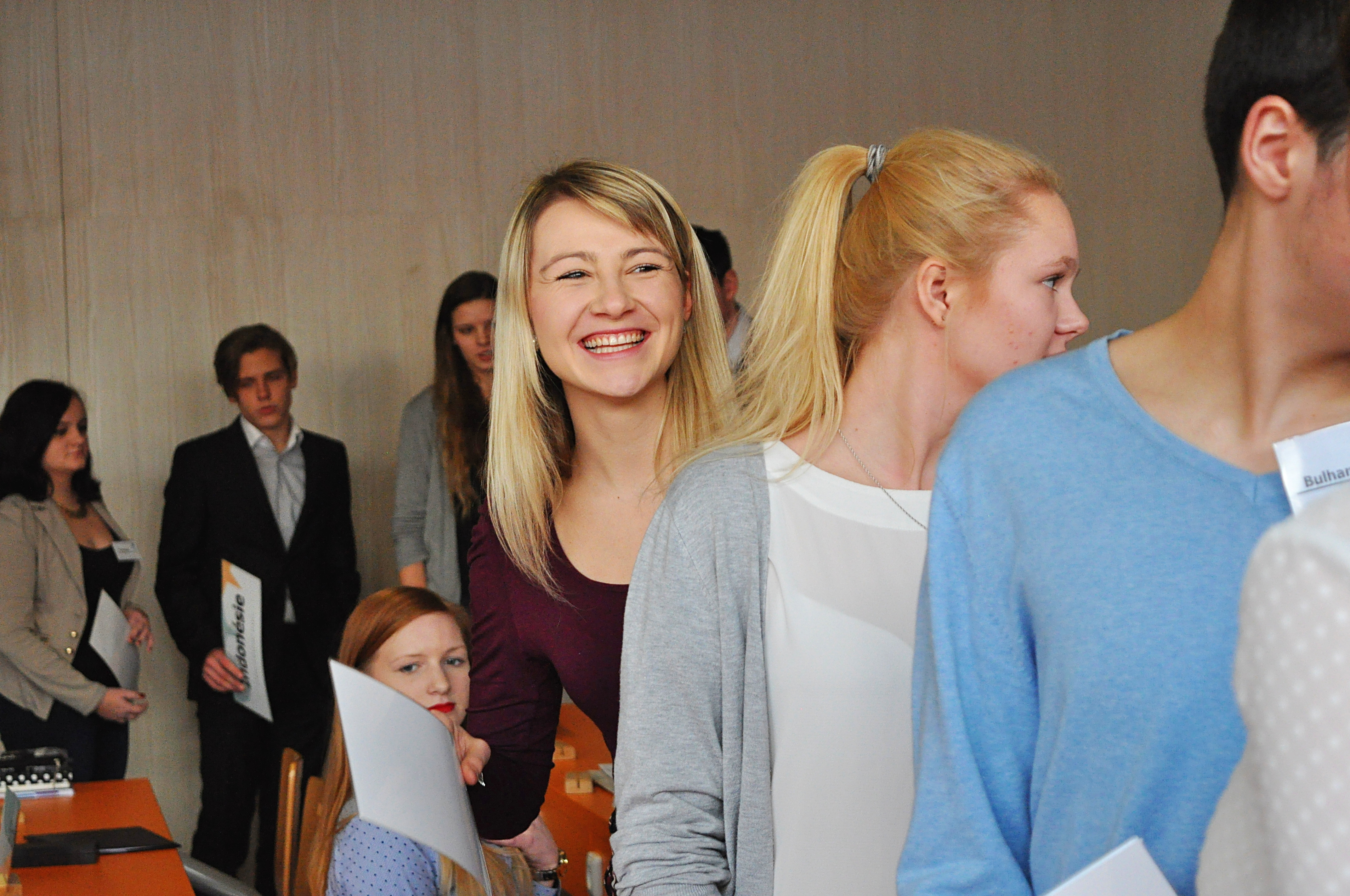 delegatka